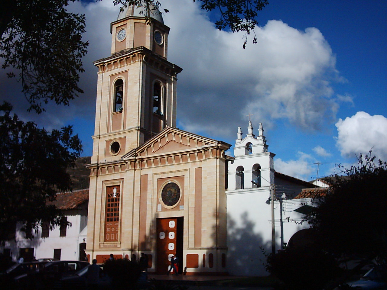 Iglesia de Iza (Boyacá), Colombia